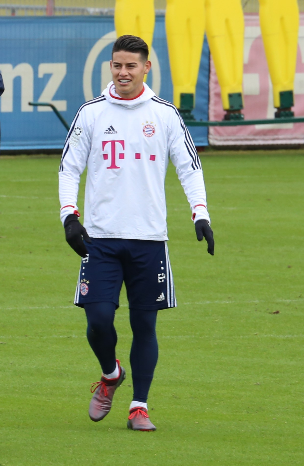 James Rodríguez beim Training auf dem Gelände des FC Bayern München (Januar 2018)